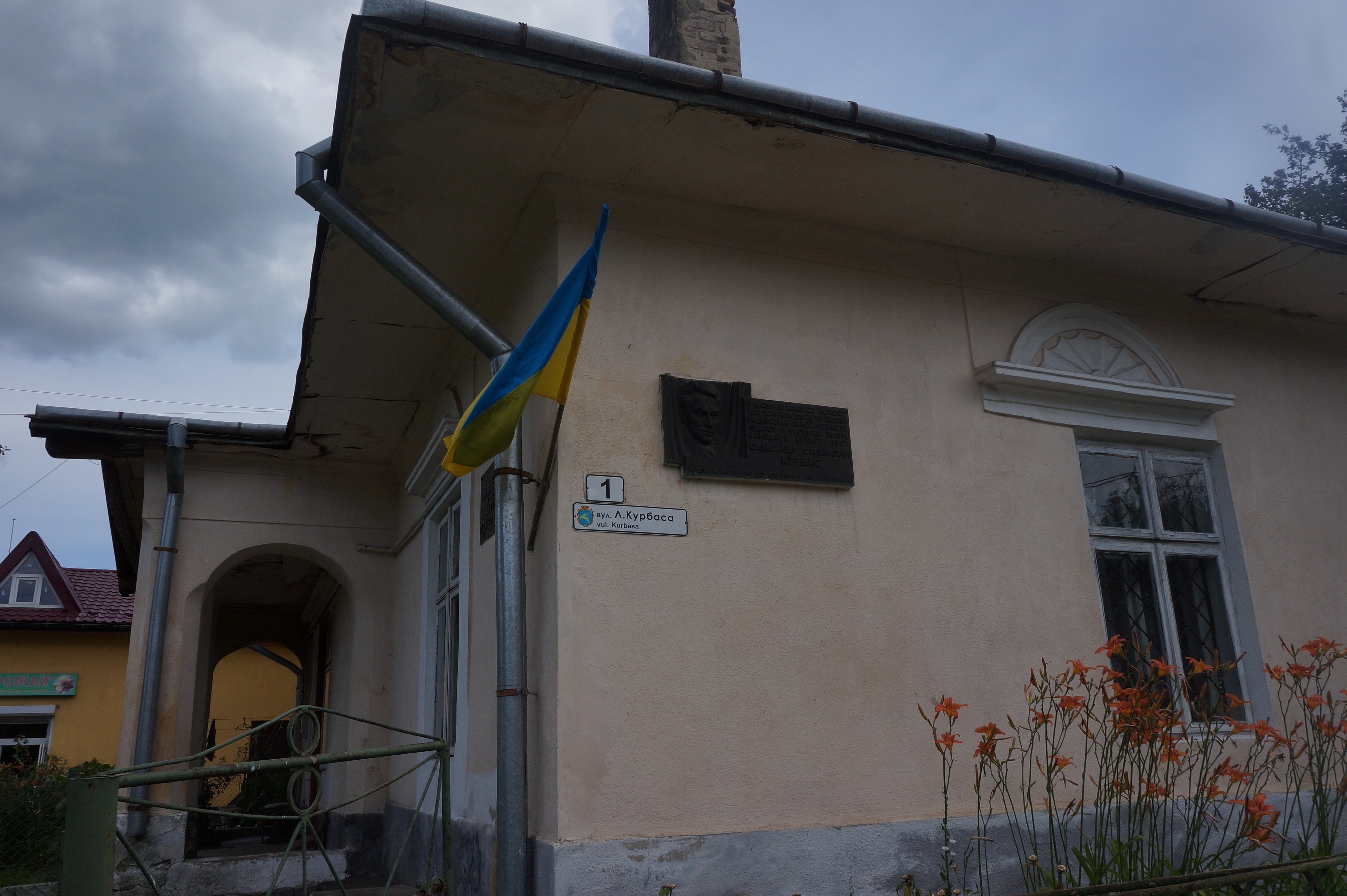 Будинок, в якому народився Лесь Курбас, основоположник українського театру, актор, режисер, педагог і теоретик театру (худ.-мем. табл., ск.Е.Мисько, 1987, бронза), Самбір, вул. Сонячна,1